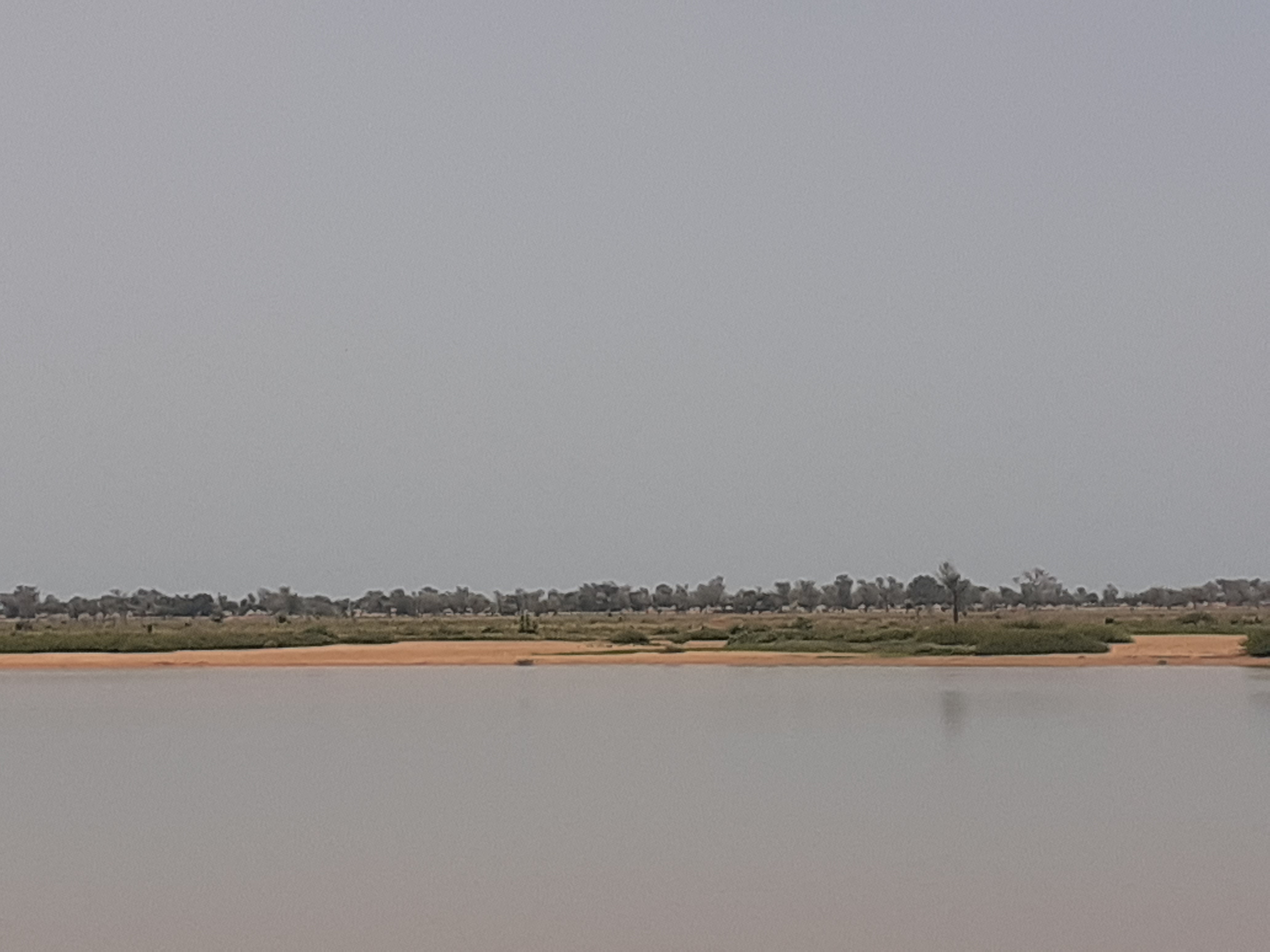 Rive du Tchad frontalière au Cameroun prise depuis la berge de Zébé Marao Cameroun.